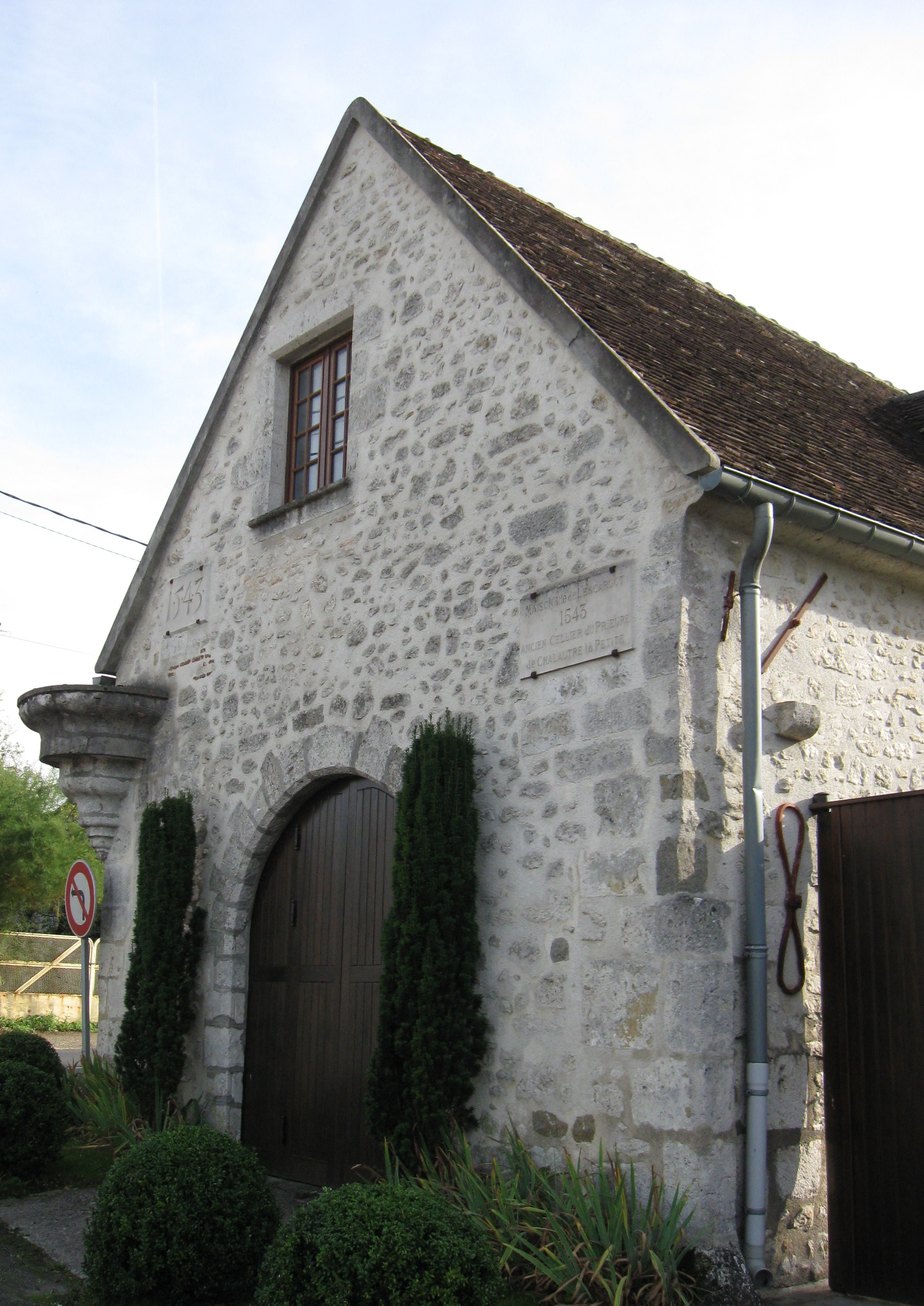 Ancienne demeure fortifiée puis ancien cellier du prieuré-cure de Chalautre-la-Petite. (département de la Seine et Marne, région Île-de-France)